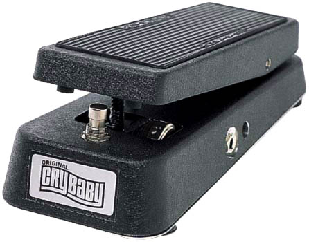 Jim Dunlop - Original Crybaby (GCB-95)